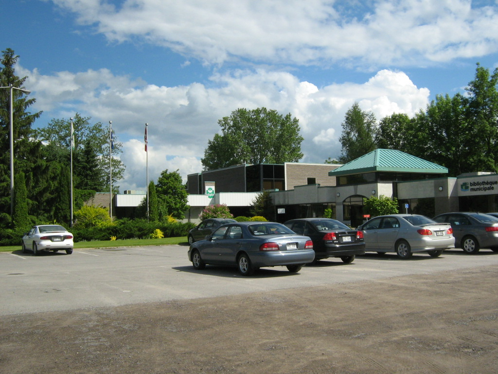 Hôtel-de-ville de Bécancour, située au Québec (Canada)